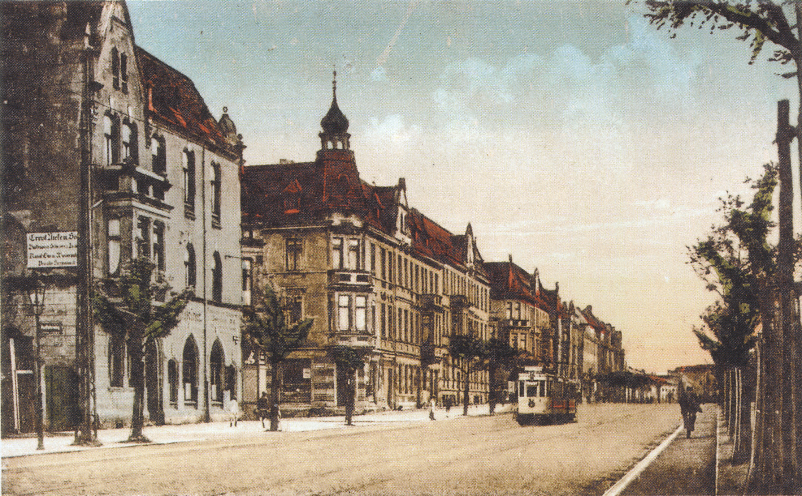 Magdeburg-Fermersleben „Eber“, Blick über die Straße Alt Fermersleben / Ecke Mahrenholtzstraße, Haus rechts die heutige (Stand 2013) Gaststätte Jahncke, Eber ist die alte Bezeichnung dieses nördlich des alten Dorfkern gelegenen Gebiets